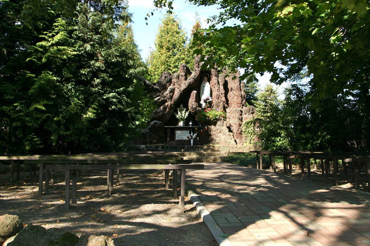 Olbrachcice (dodatkowa nazwa w j. niem. Olbersdorf) – wieś w Polsce położona w województwie opolskim, w powiecie prudnickim, w gminie Biała.